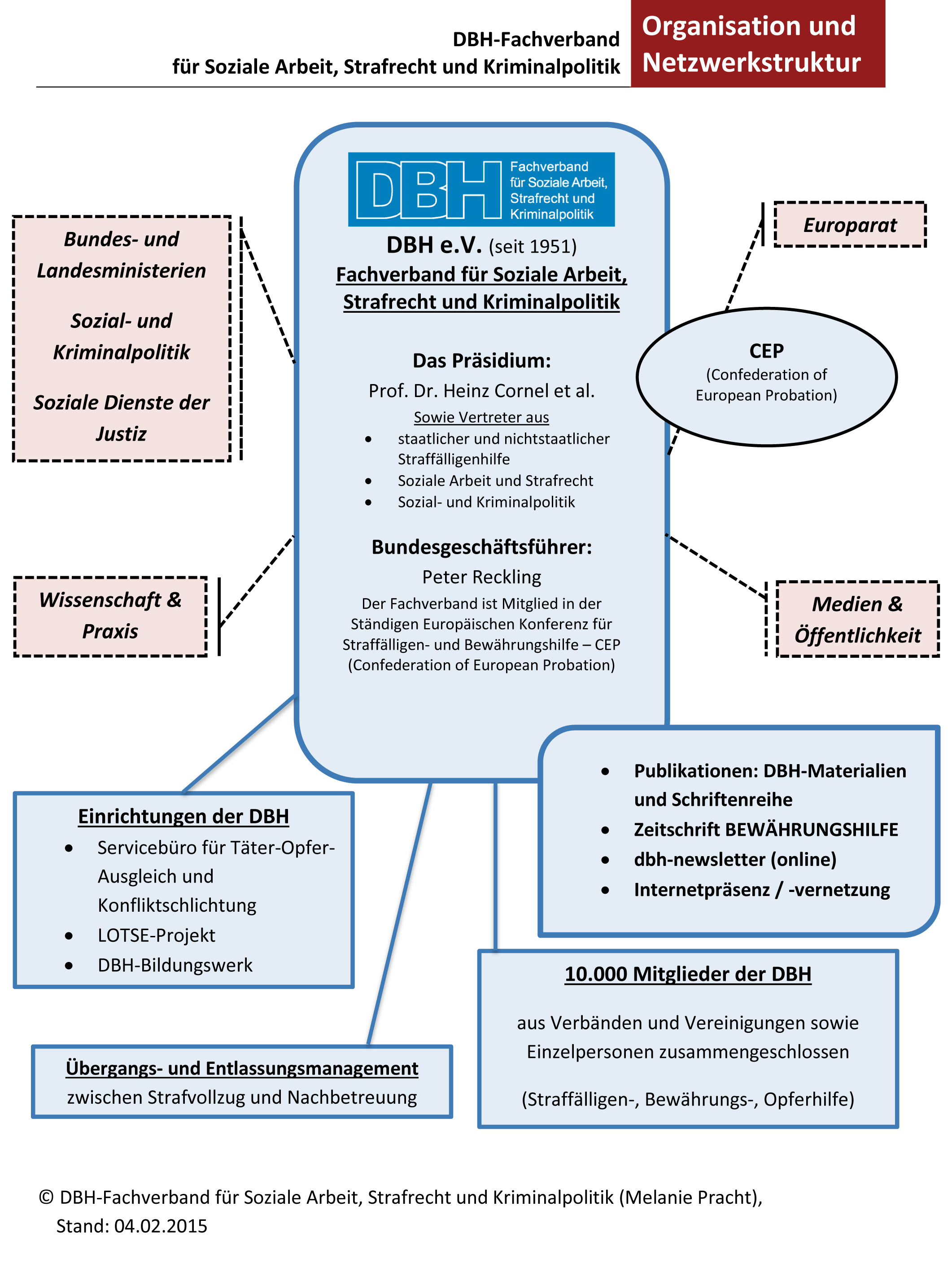 Organisations- und Netzwerkstrukturen des DBH-Fachverbandes für Soziale Arbeit,Strafrecht und Kriminalpolitik